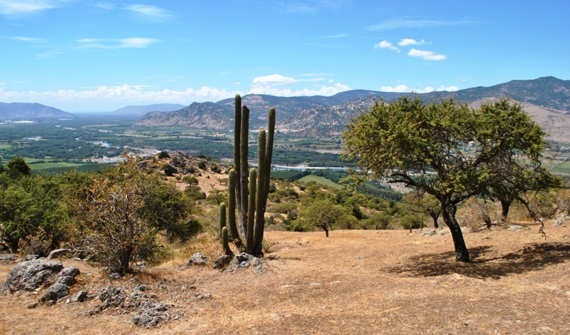 Vista panorámica valle del río Mataquito desde cerro Chiripilco